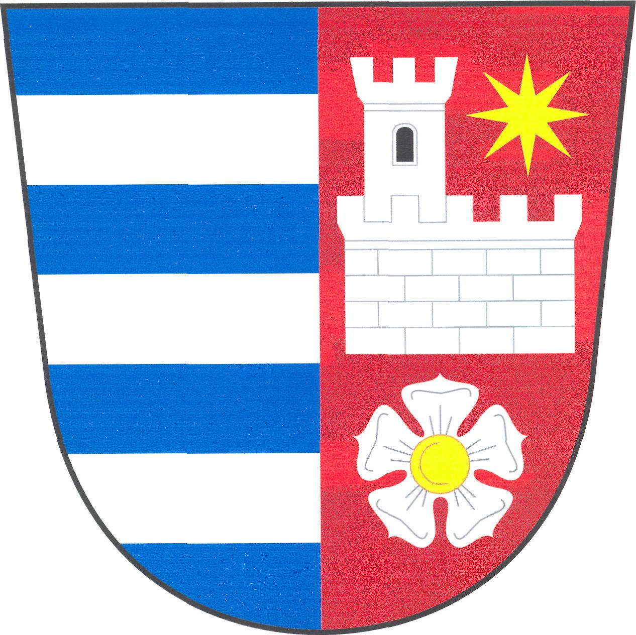 Znak obce Losiná